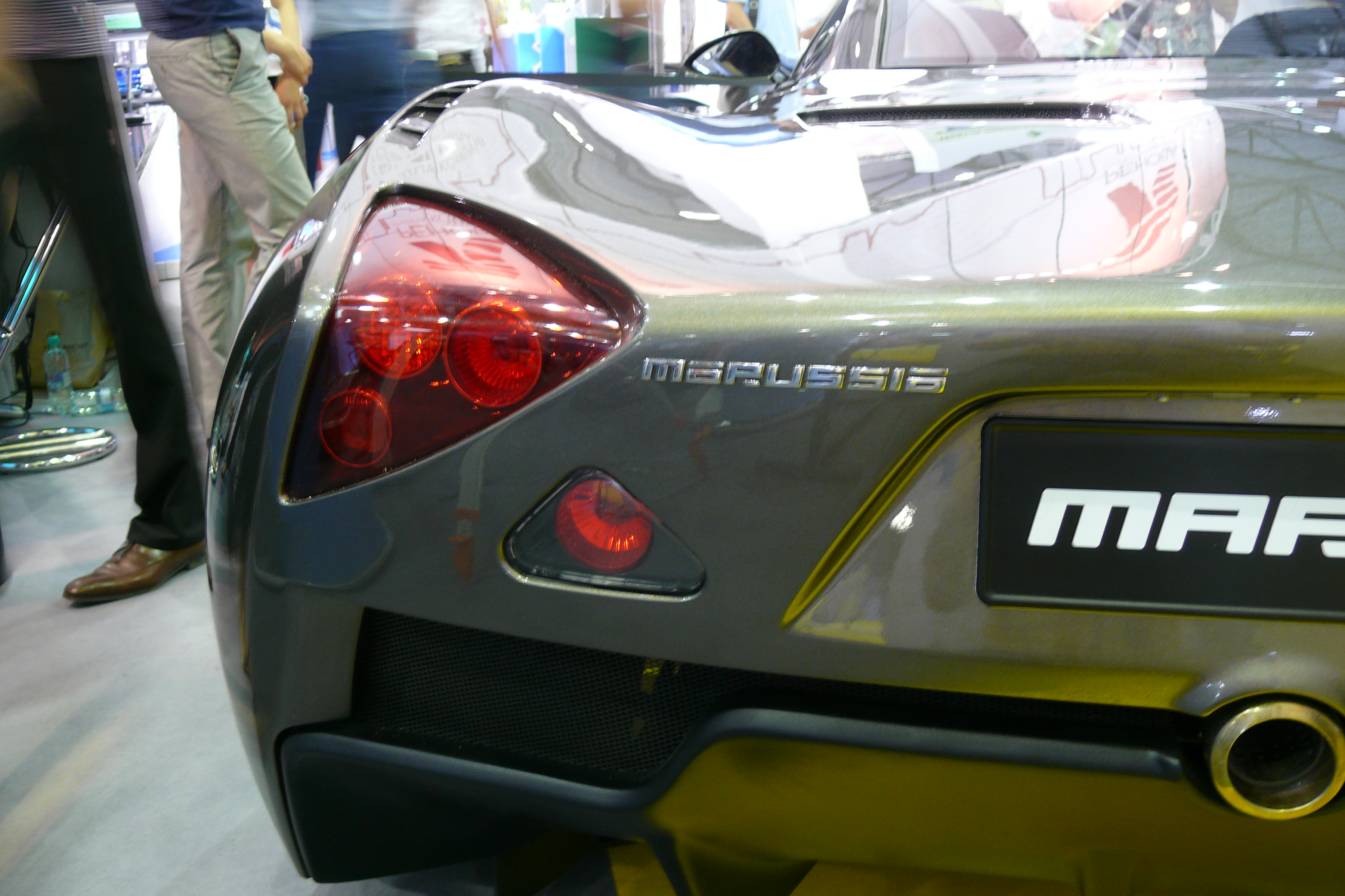 MARUSSIA B1 Back